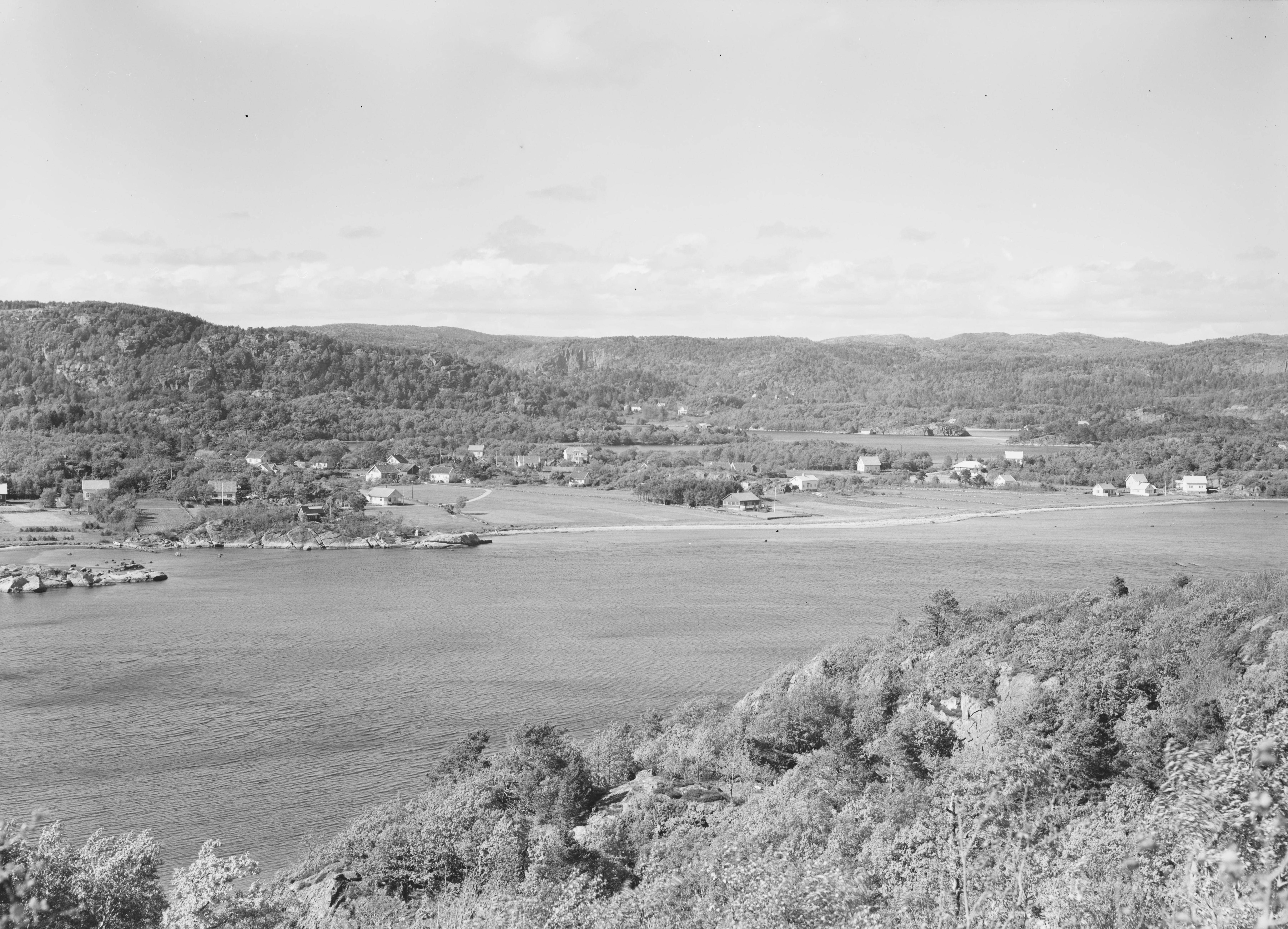 Bildet er hentet fra Nasjonalbibliotekets bildesamling. Anmerkninger til bildet var: fotograf ukjent Sånum, Mandal, Vest Agder